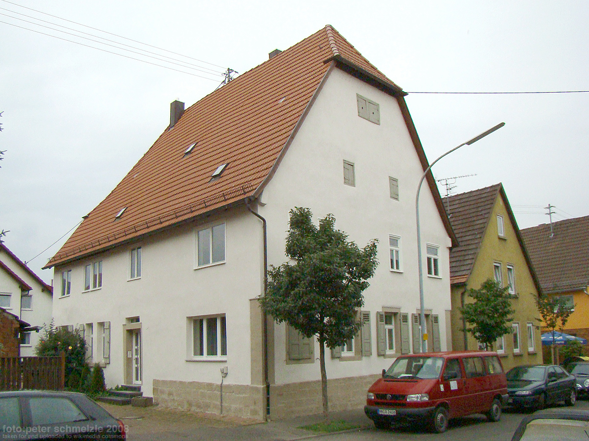 Denkmalgeschütztes Gebäude Schleusenstr. 21 in Heilbronn-Horkheim